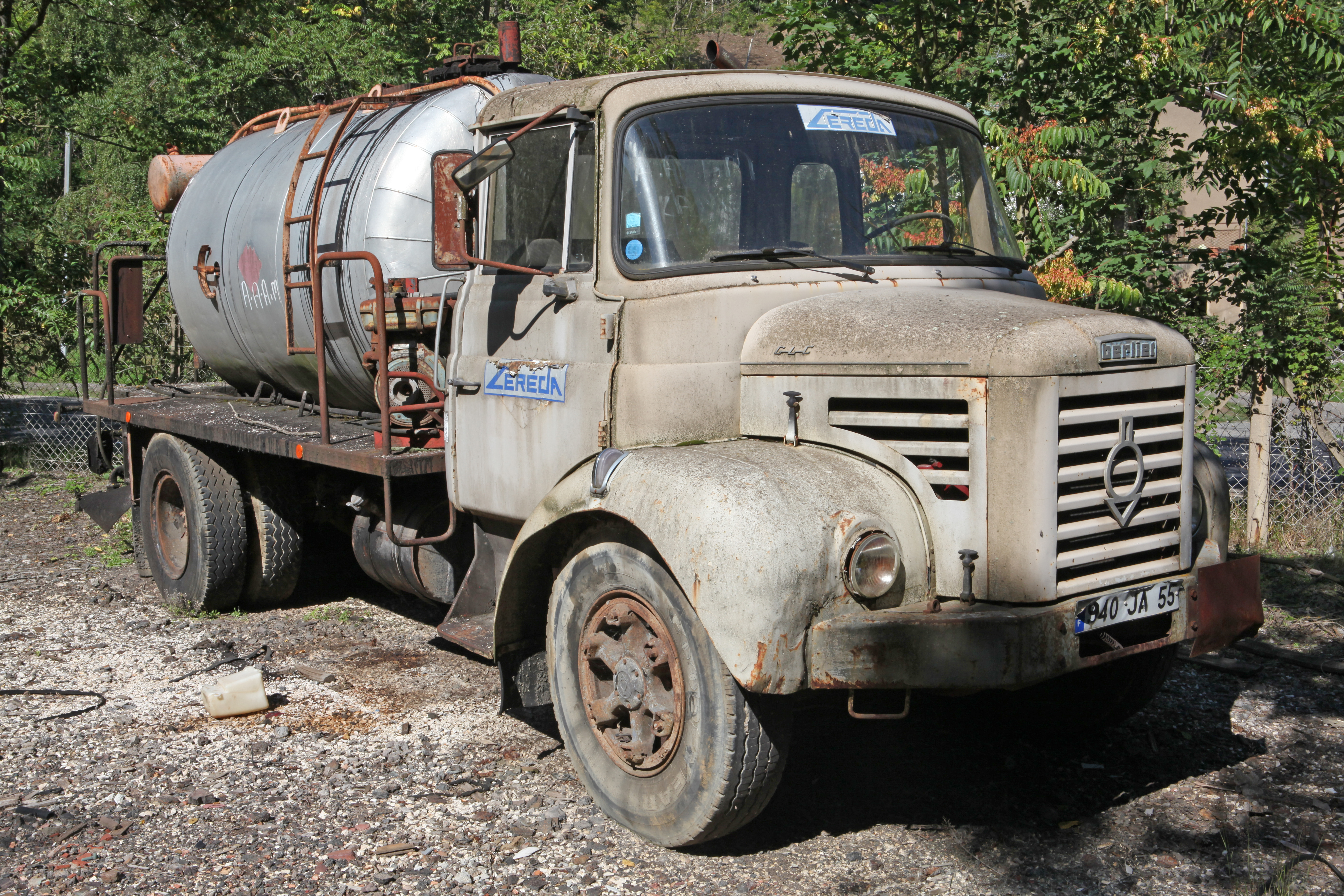 Berliet CLC truck